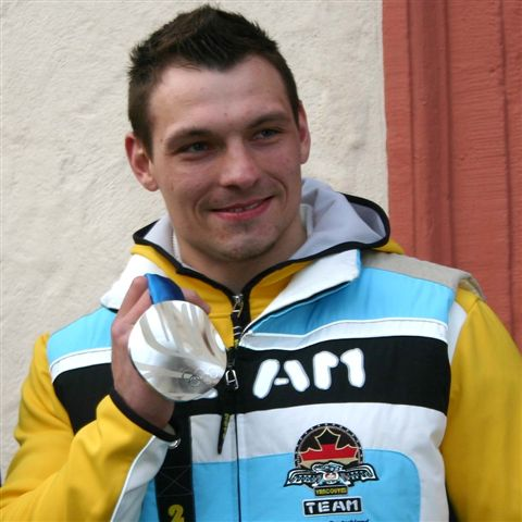 Martin Putze, Gewinner der Silbermedaille 2010